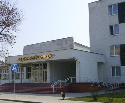 Галоўны ўваход у каледж